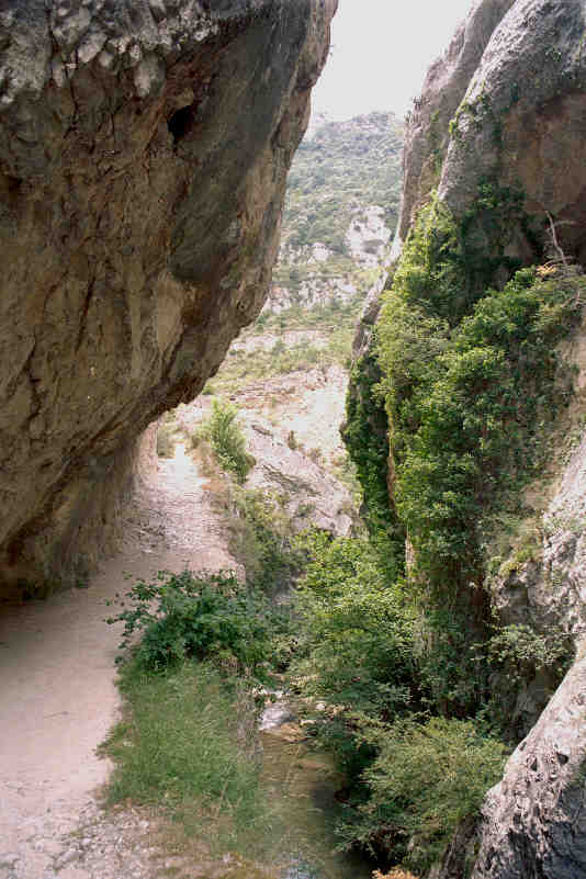 Desfiladero del río Purón, en el Parque natural de Valderejo, entre las provincias de Álava y Burgos (España). Tomada por JMSE el 4 de julio de 2003 y cedida a Wikipedia.